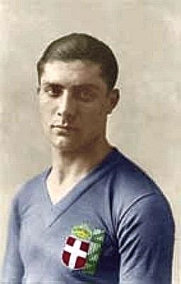 Giuseppe Meazza agli esordi con la nazionale a 20 anni.